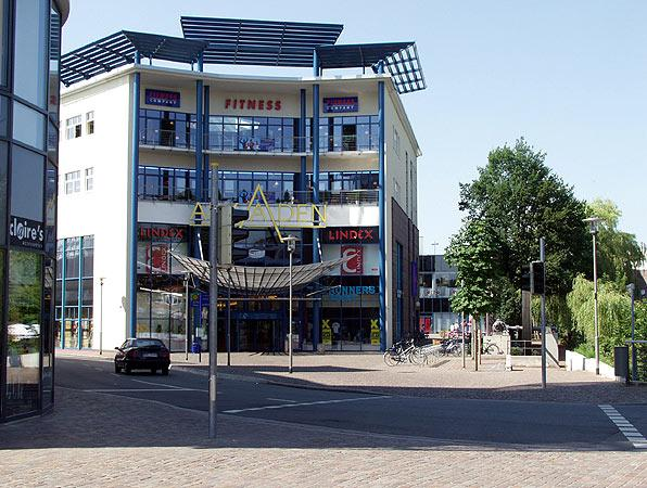 Shopping-Arkaden (Bocholt)